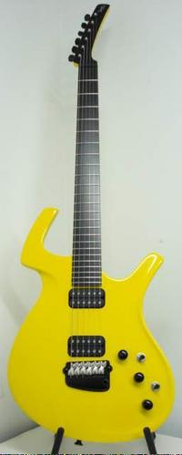 Parker Fly